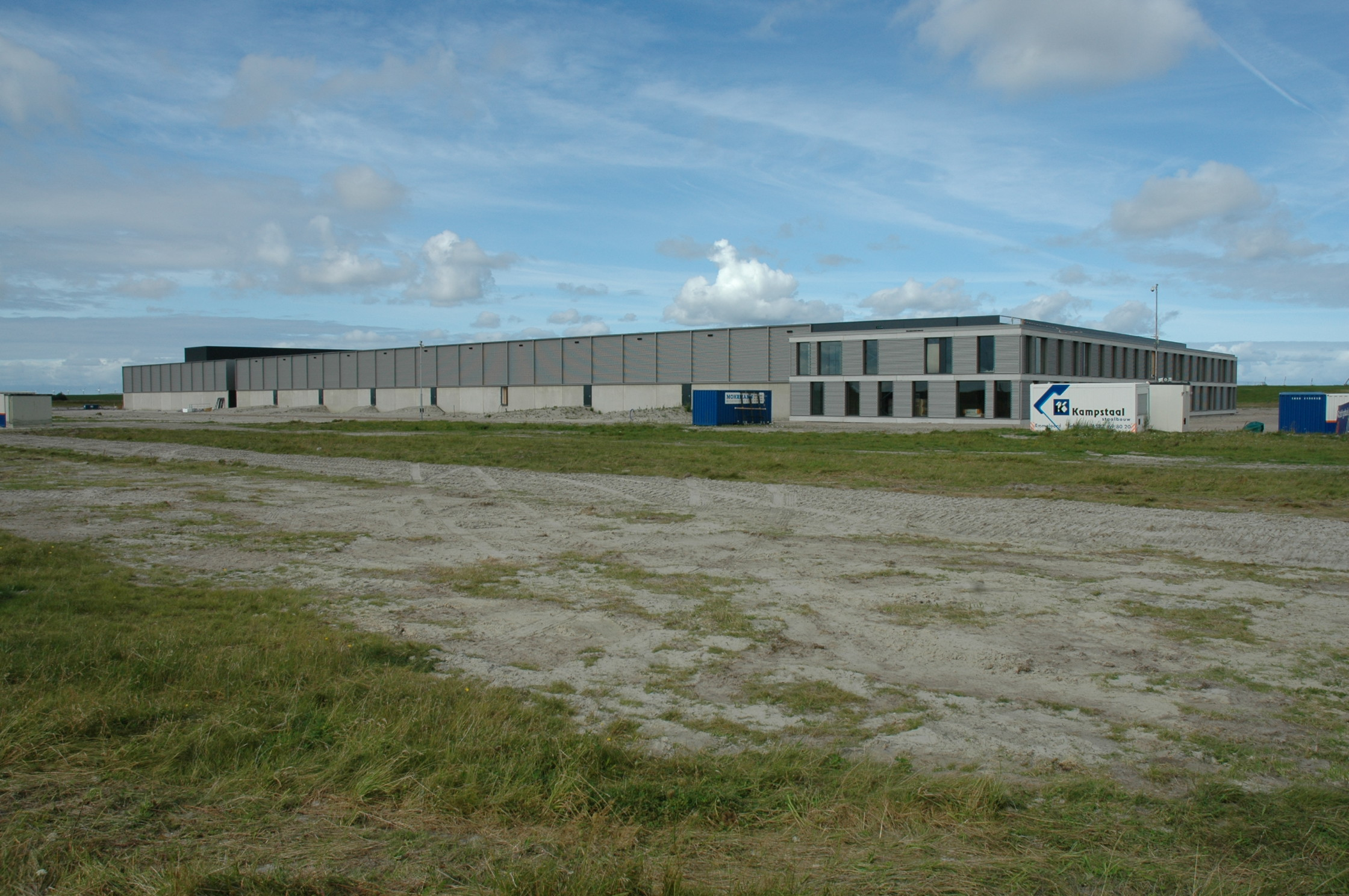 Google datacenter (2007)